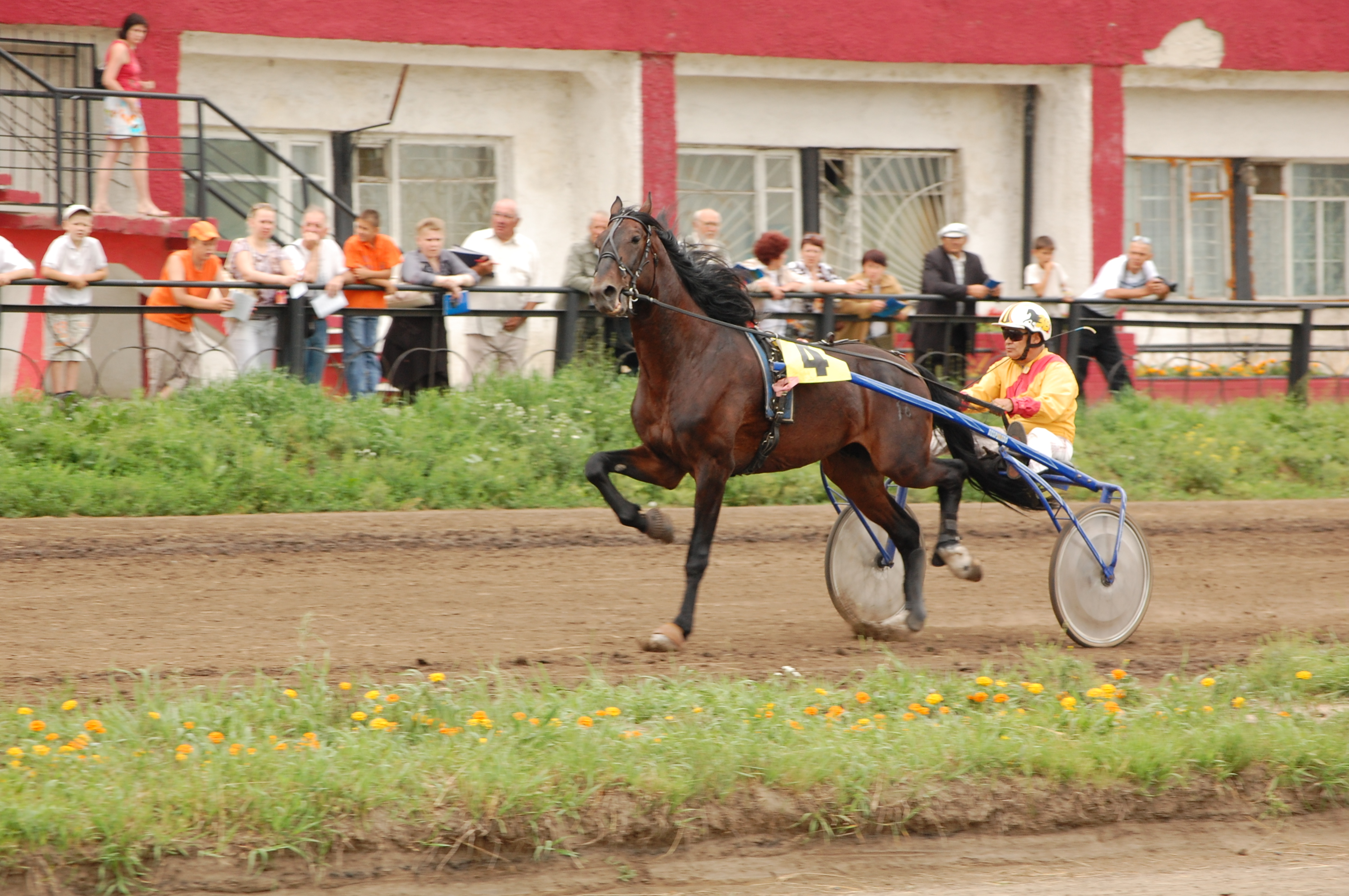 Скачки на Алтайском краевом ипподроме